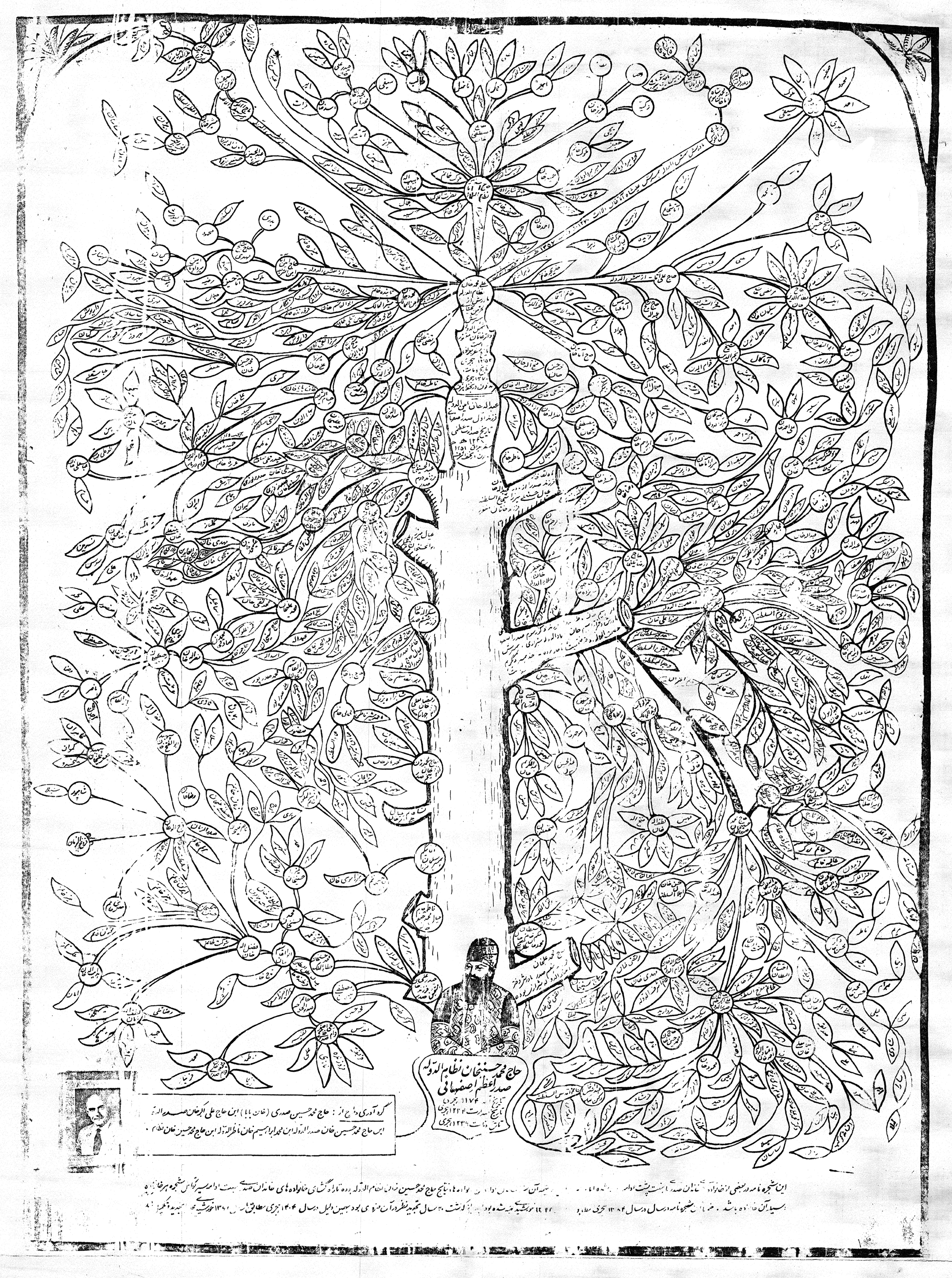 این شجره نامه توسط حاج محمد حسین صدری گردآوری شده است